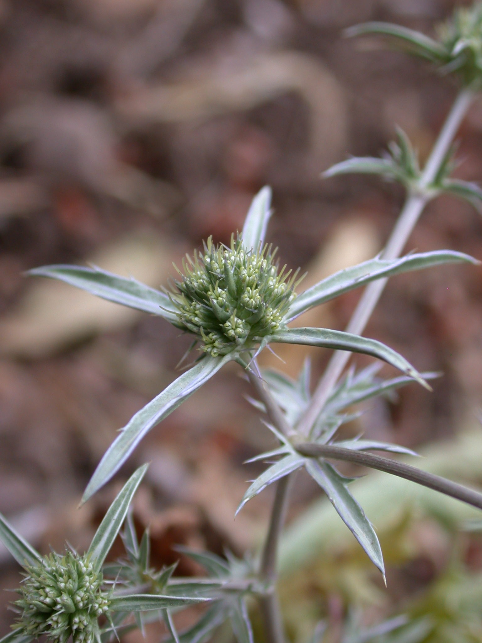 Eryngium creticum Lam. (חרחבינה מכחילה), Mount Carmel, Israel, April 2008.